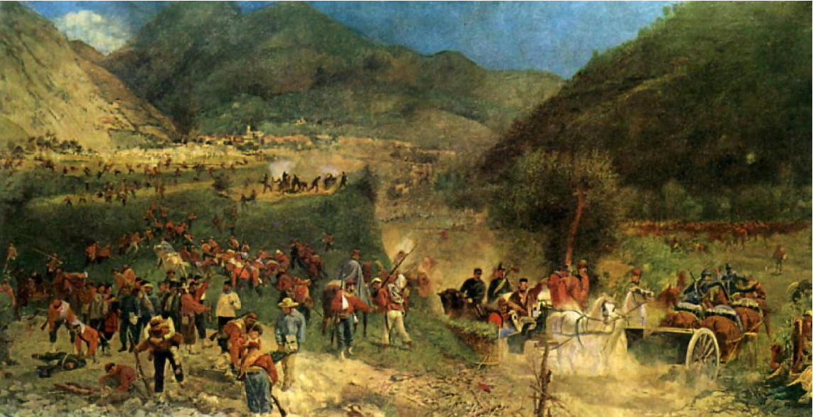 Bataille de Bezzeca, 21 juillet 1866. Huile sur toile